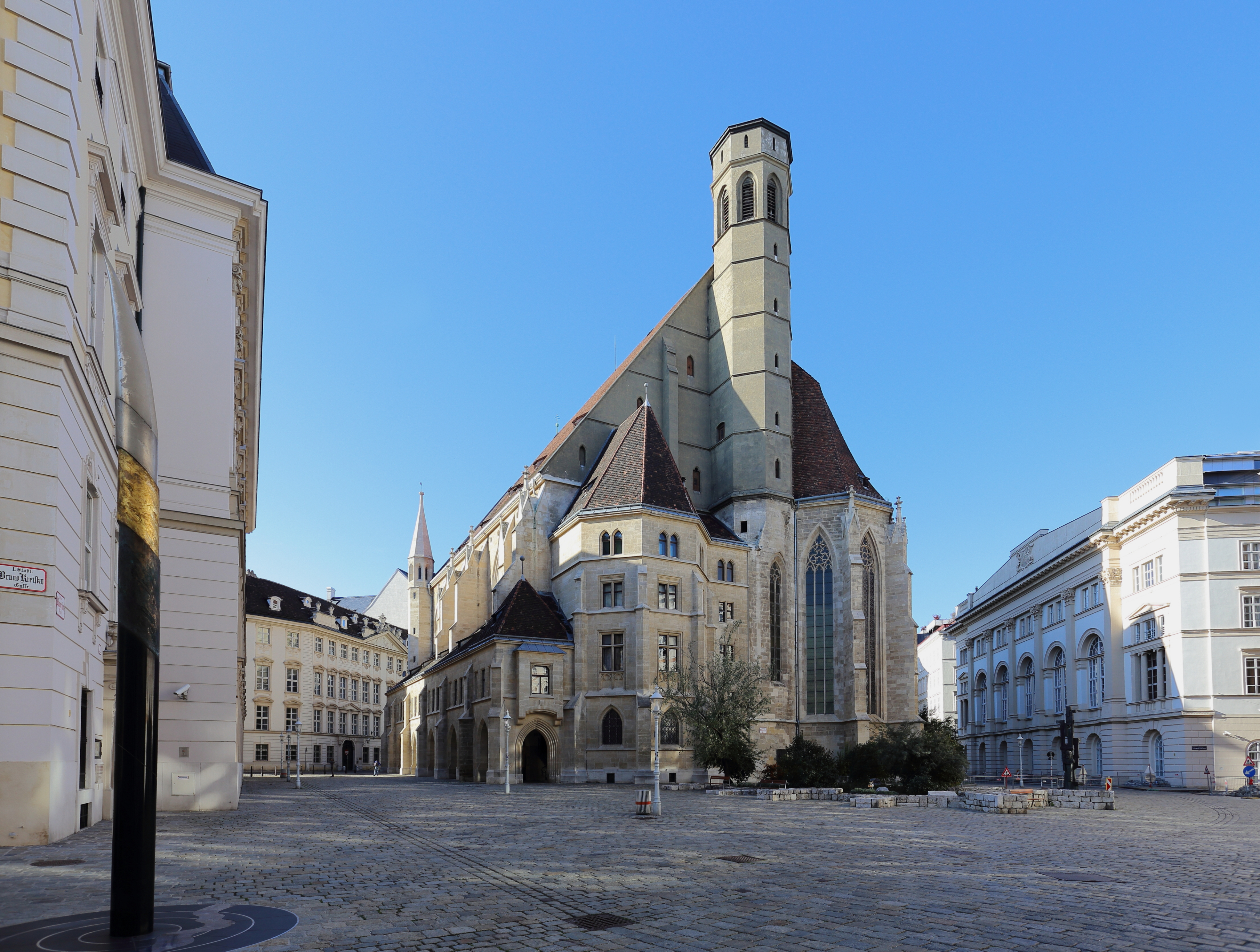 Der Minoritenplatz in der österreichischen Bundeshauptstadt Wien. Im Zentrum die dominierende Minoritenkirche. Davor (rechts unten im Bild) der mit Steinen nachgezeichnete Grundriß der mittelalterlichen Ludwigskapelle, die im 18. Jahrhundert zu einem Wohnhaus umgebaut und 1905 abgerissen wurde.